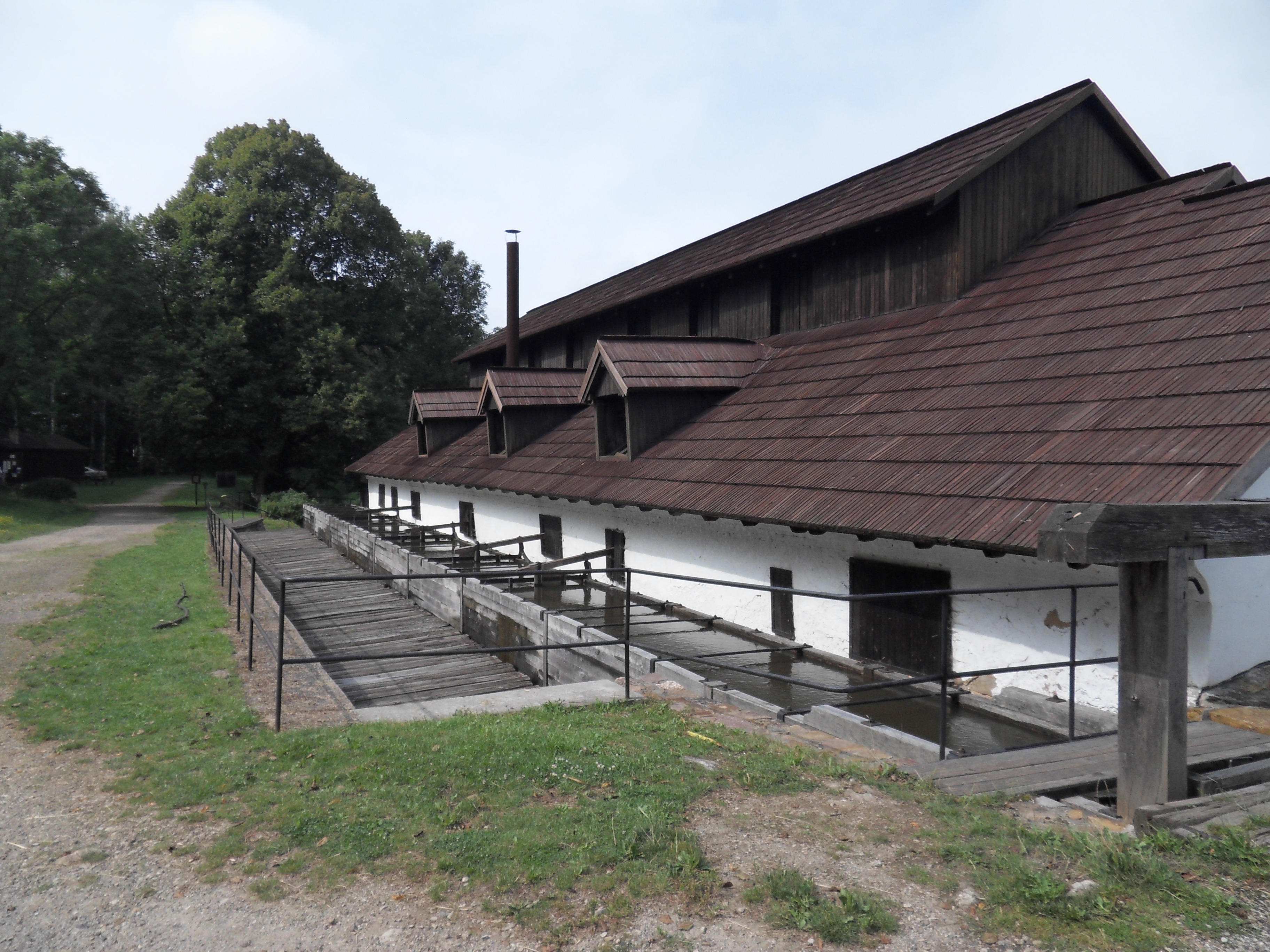 Horní hamr Dobřív - pohled od východu, pod Huťským rybníkem, S část obce, Dobřív, Dobřív.